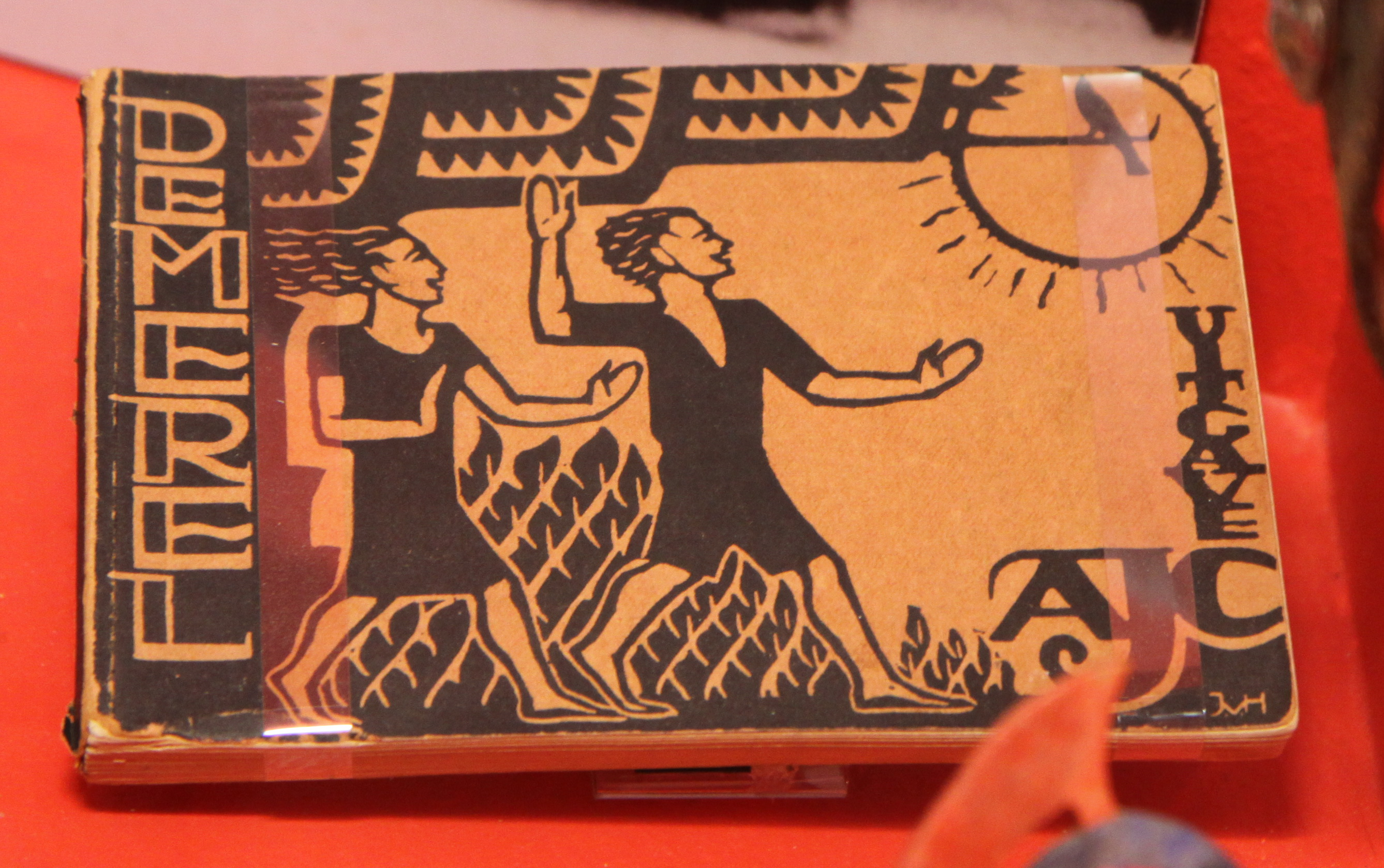 Muziekbundel De Merel door Piet Tiggers (fotonummer 090626-111737_ 1553_50D)